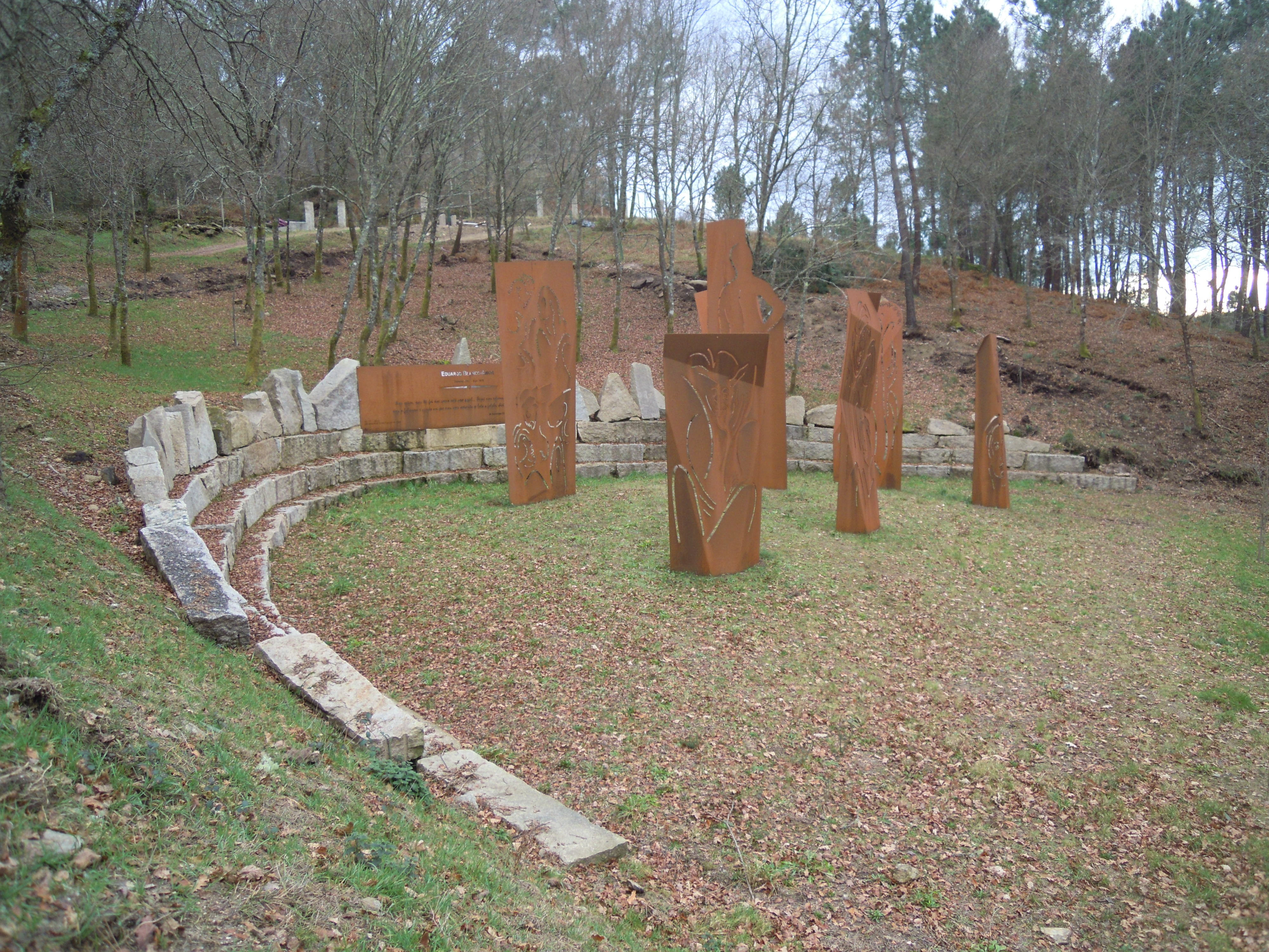 Conxunto en homenaxe a Eduardo Blanco Amor na Insua dos Poetas